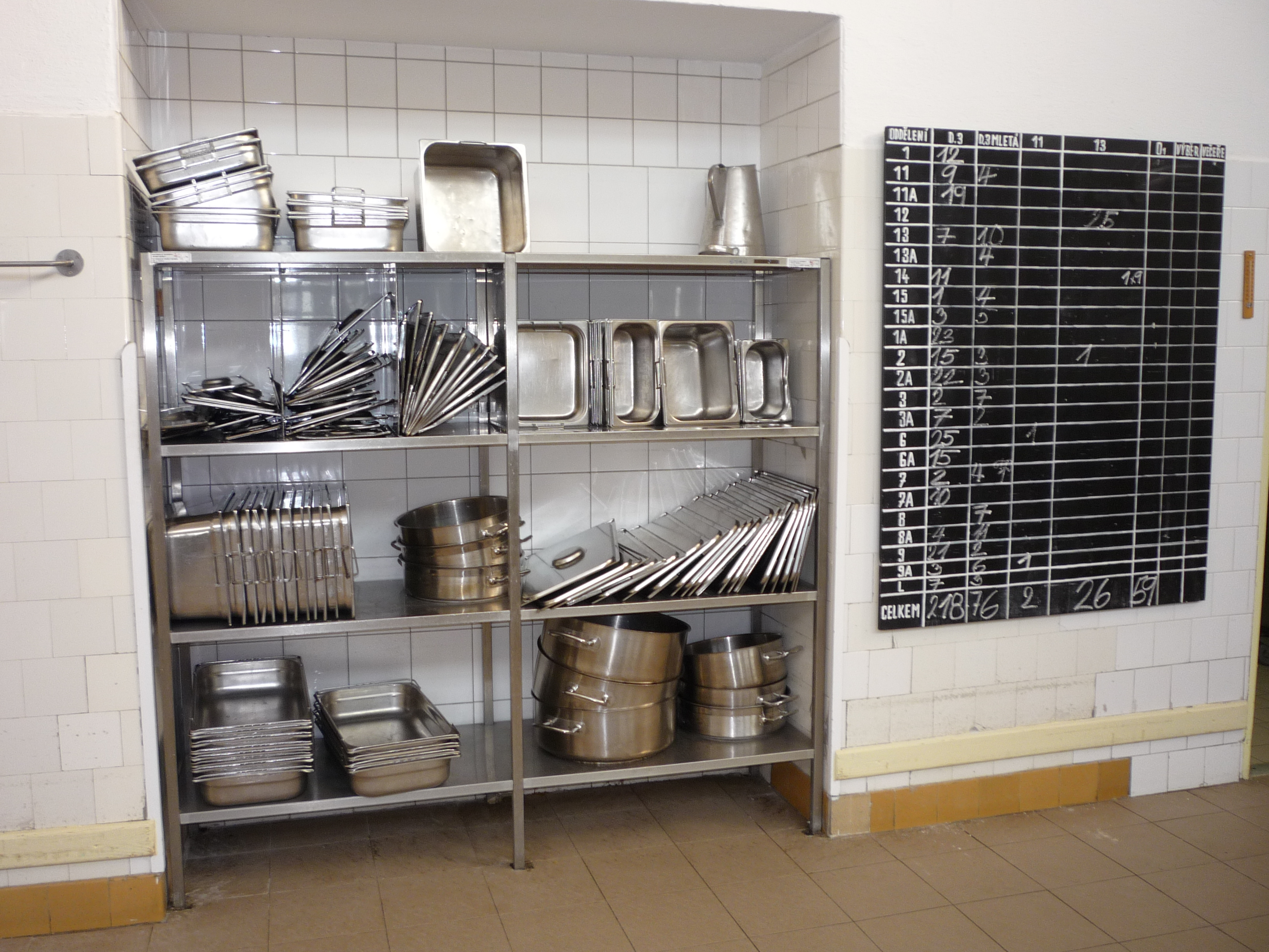 Autor fotografie Jiří Zelenka. Psychiatrická nemocnice Havlíčkův Brod - hospodářský provoz (nářadí a nadobí). Rozkošská 2322, 58023 Havlíčkův Brod. Kraj Vysočina. Czech Republik.